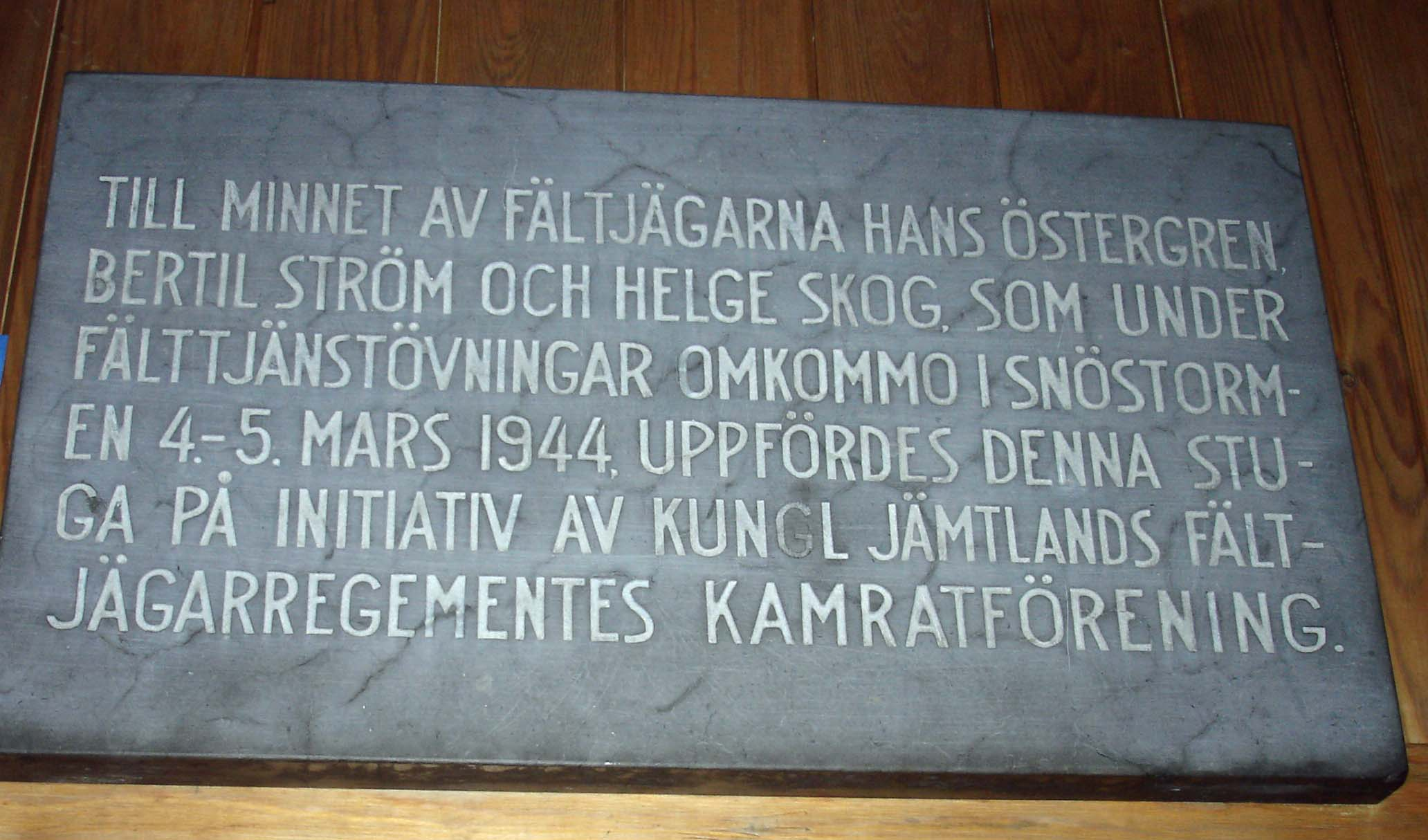 Minnestavla över fältjägare omkomna i snöstorm 1944